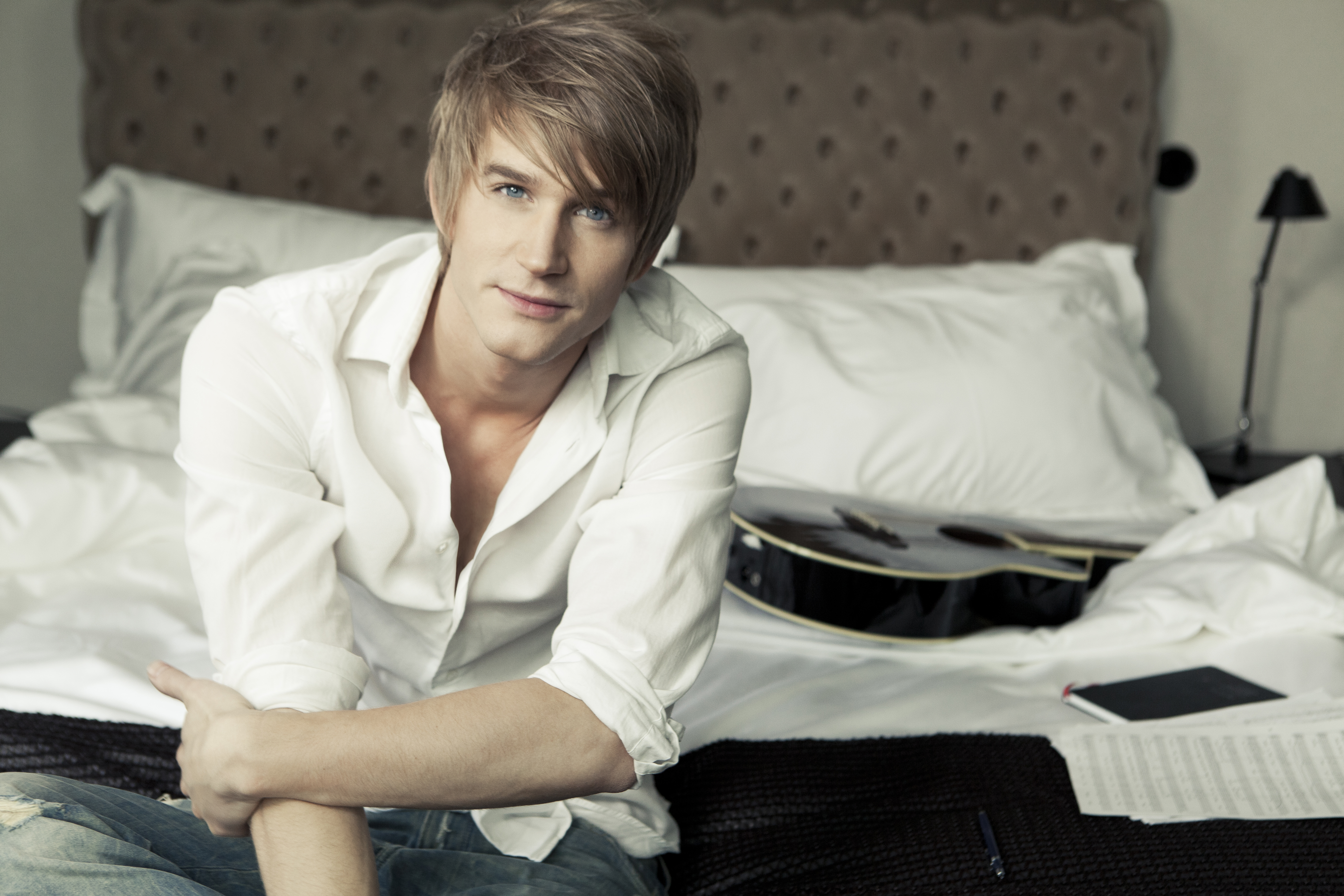 Erik Linder